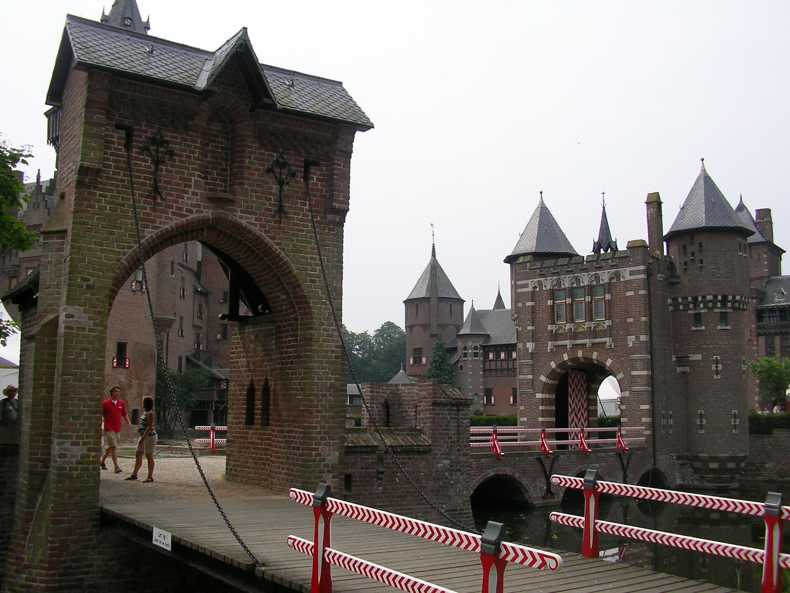 Kasteel De Haar 22 juli 2006 Gemaakt door wikipedia vrijwilliger gijsevers